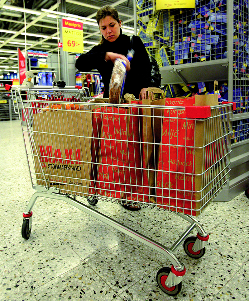 Moderner Spezialtransportwagen für Baumärkte, Modellreihe SP5